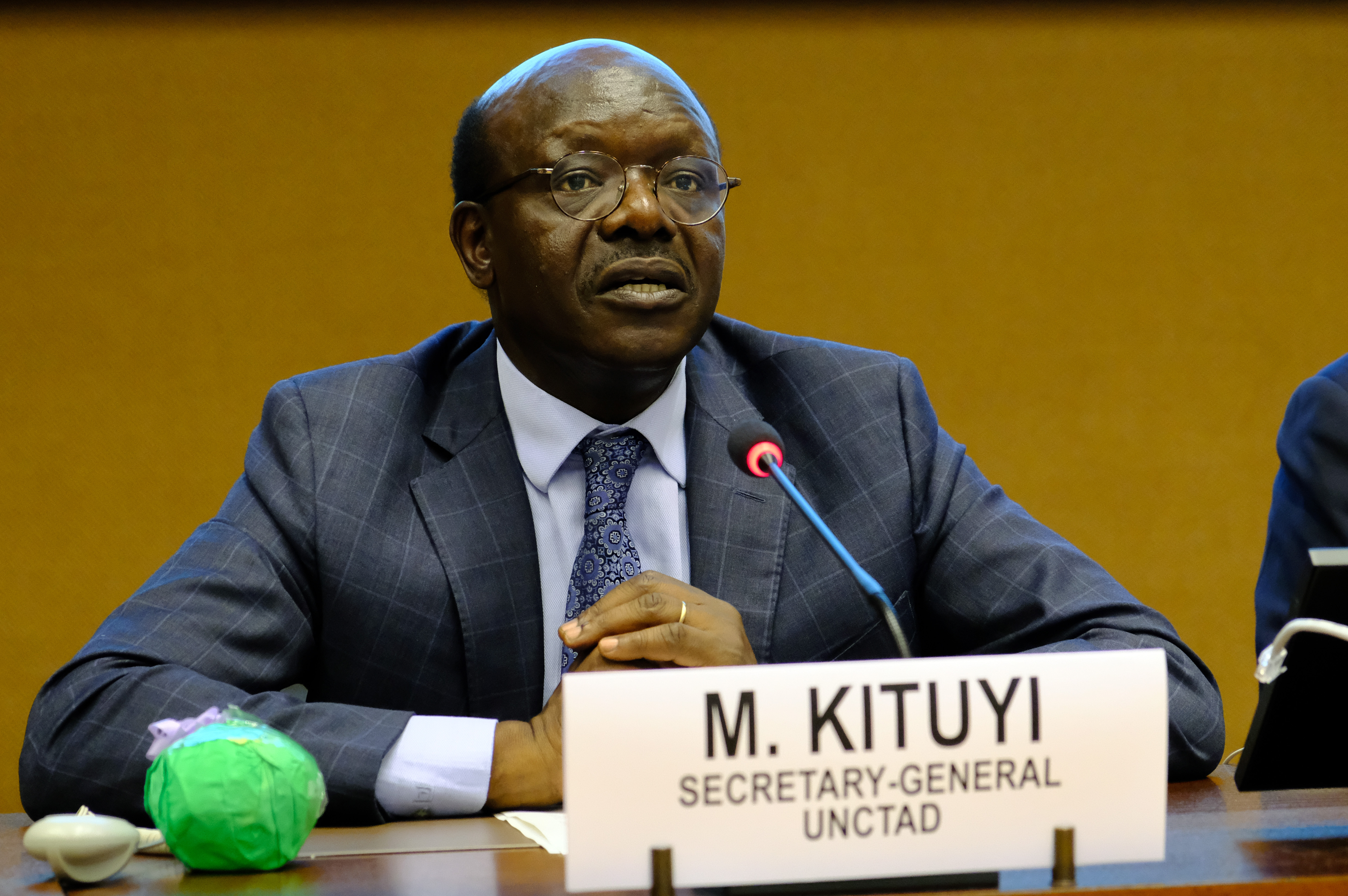 Mr. Mukhisa Kituyi, Secretary-General, UNCTAD